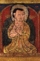 Richen Zangpo (b.958 - d.1055) famous Tibetan Buddhist scholar